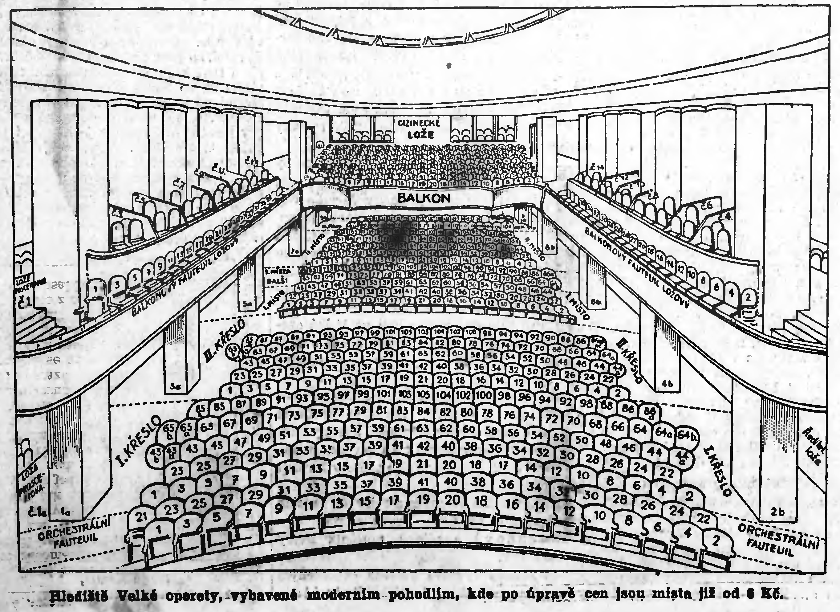 Hlediště Velké operety, Praha, 1933